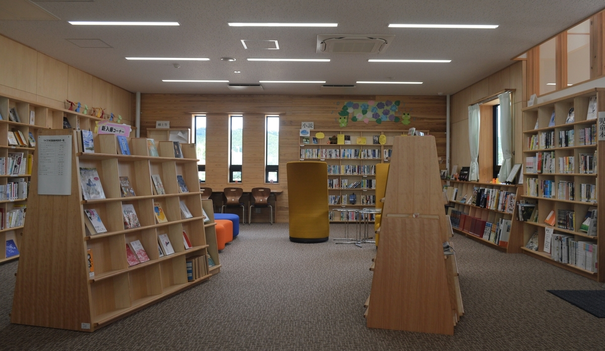 愛知県新城市にある新城市つくで交流館図書室。